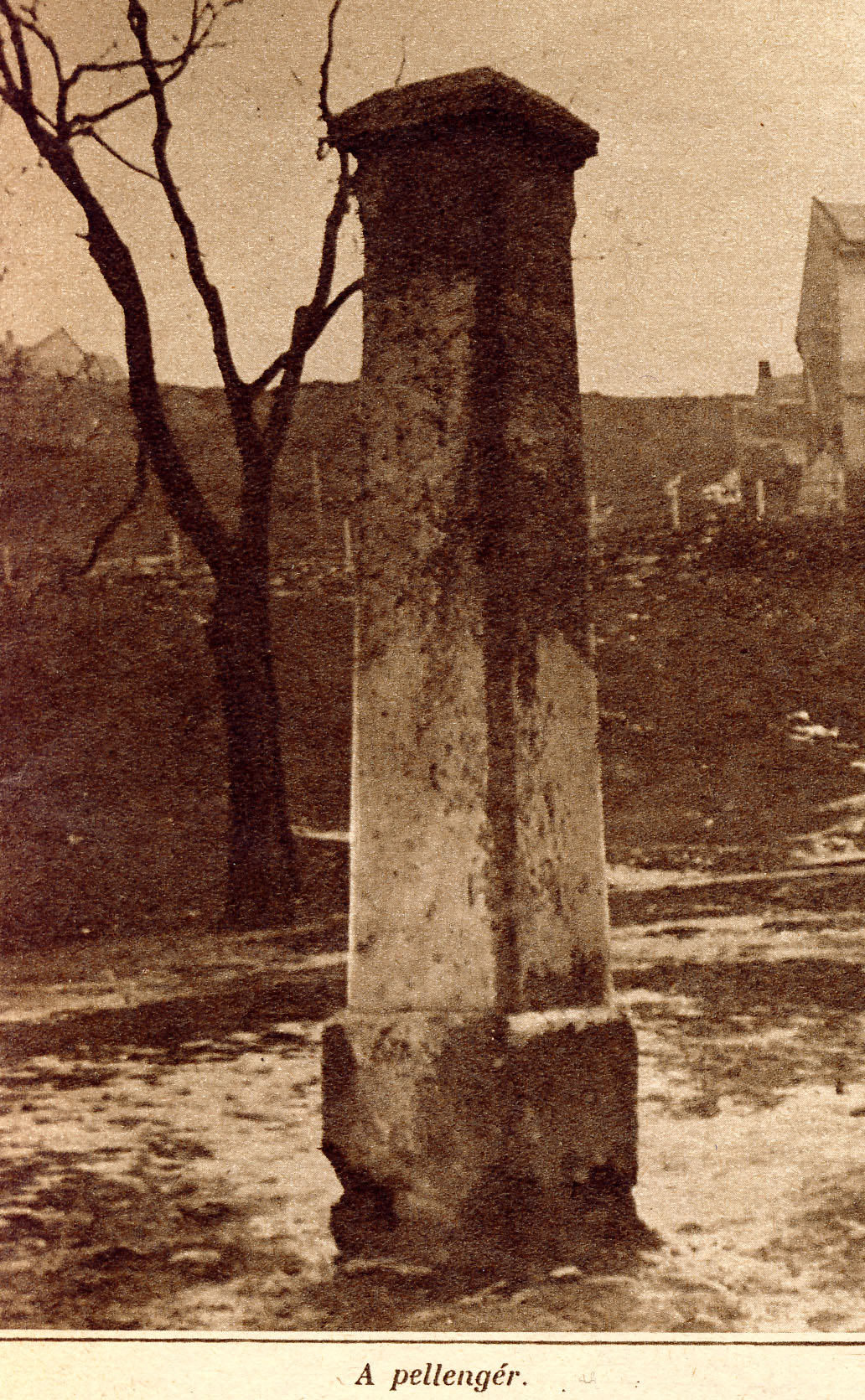 Budapest, Tabán, A pellengér.